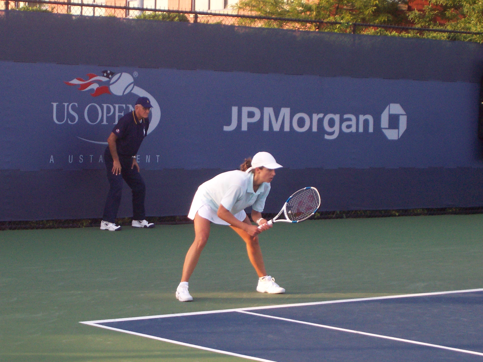 Emmanuelle Gagliardi At The 2007 US Open